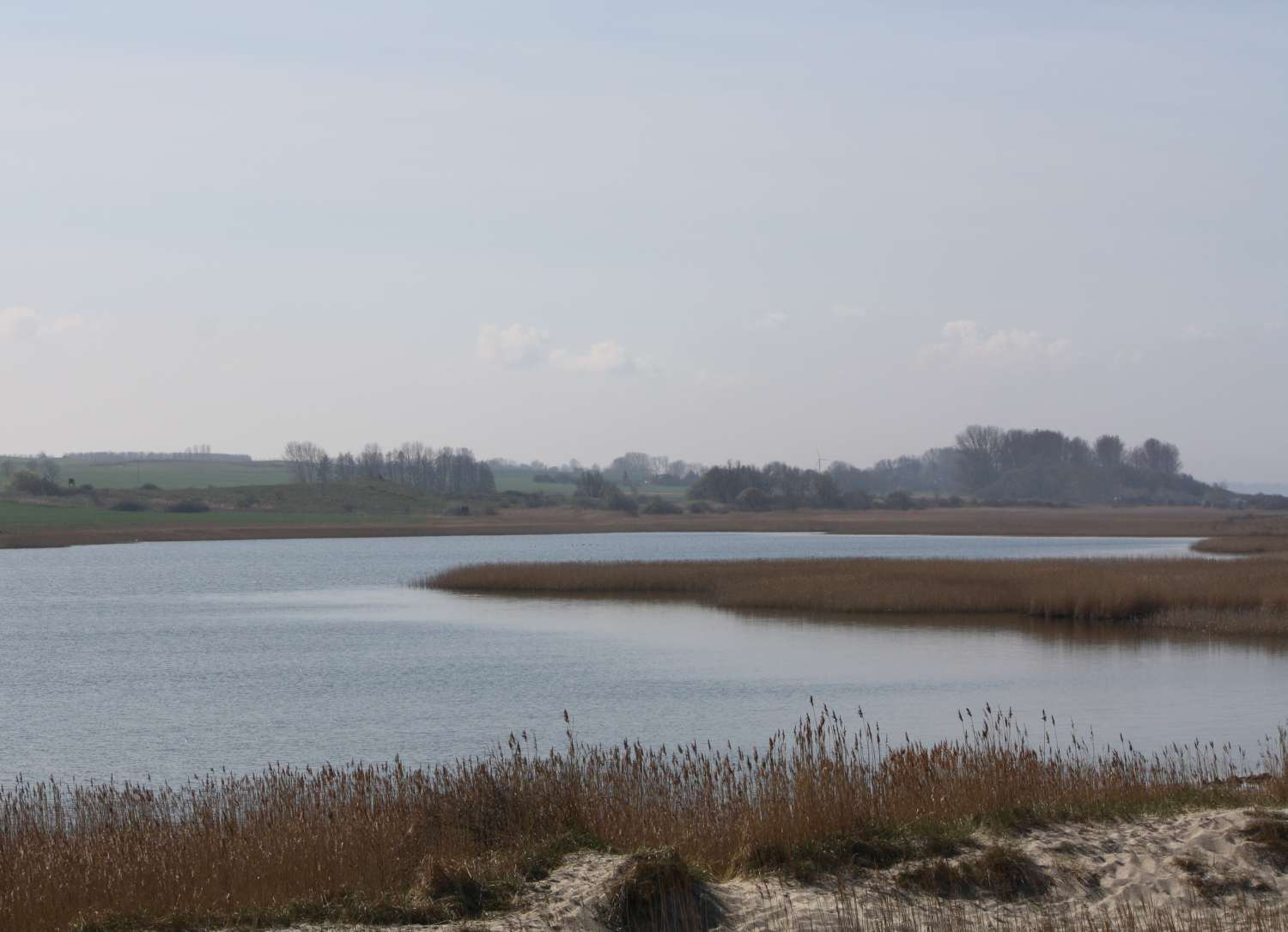 Blick von Norden auf den Riedensee in Mecklenburg-Vorpommern.